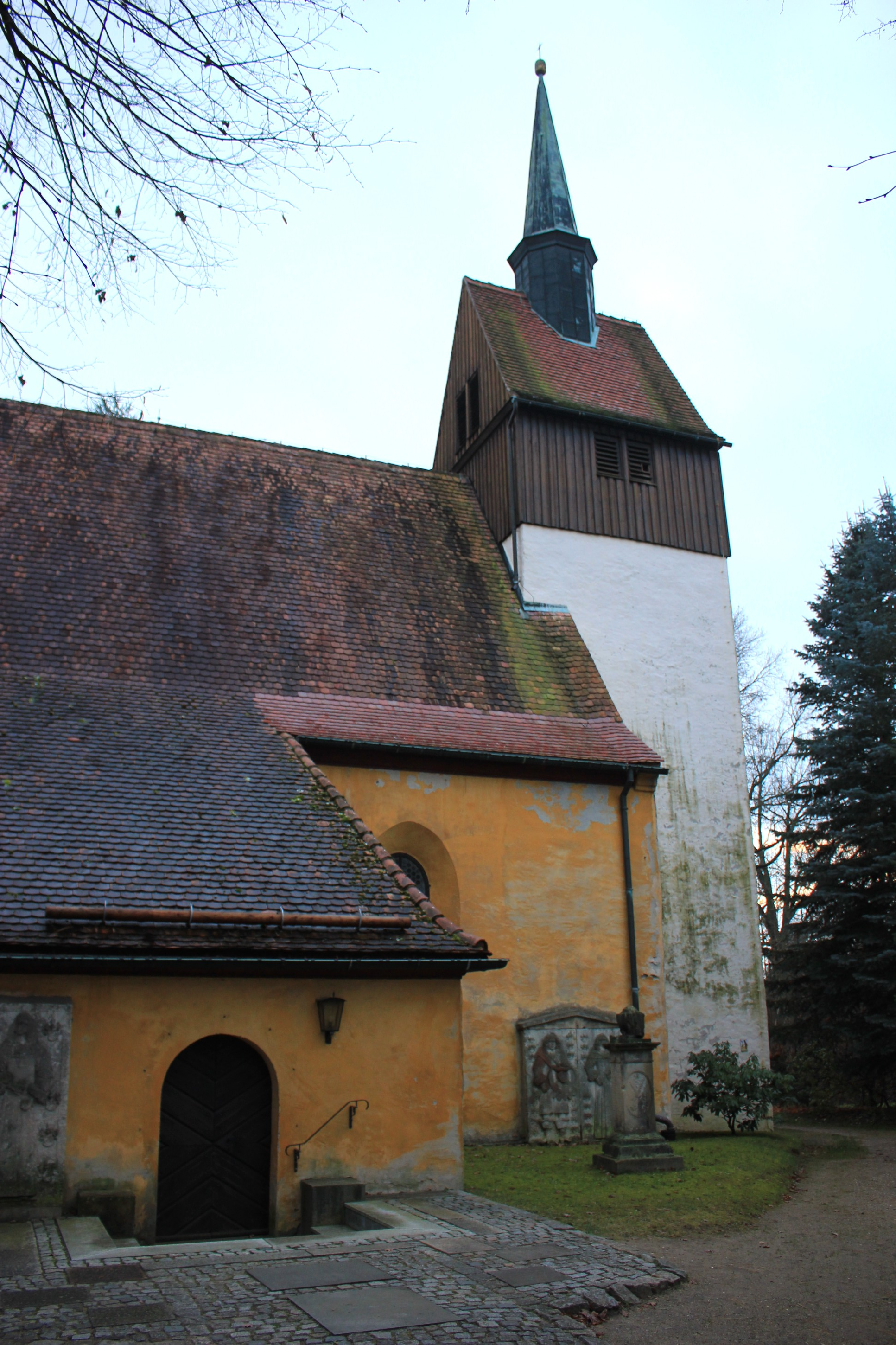 Hornjoserbsce: Ewangelska cyrkej w Dołhej Boršći.